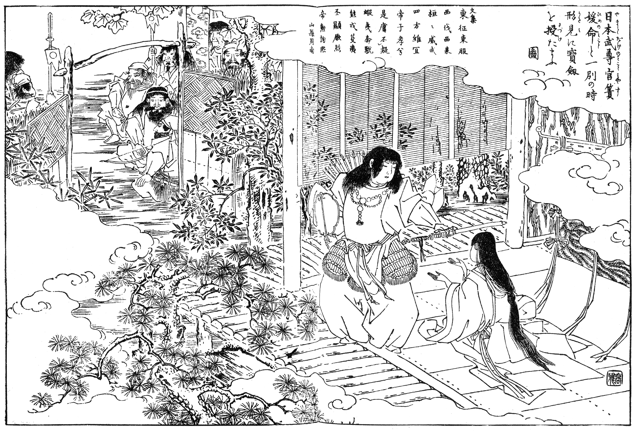 日本武尊宮簀媛命と一別の時形見に寳剱を授たまふ圖（『尾張名所図会』より）。こちらも展示より 「大和武尊、宮簀媛命に宝剣を預ける図」